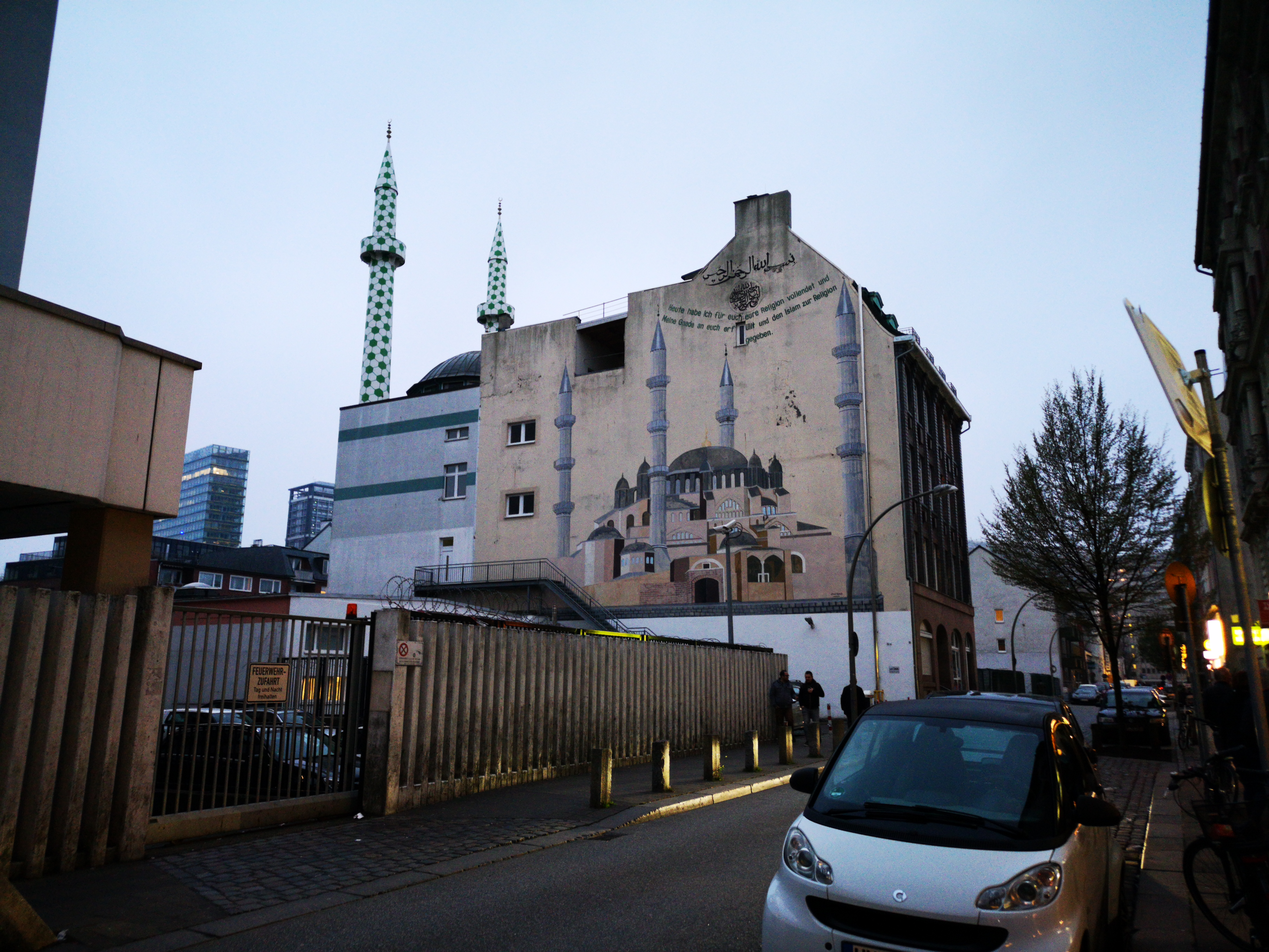 Centrum-Moschee Hamburg von der Böckmannstraße aus gesehen - Aus dem Steindamm kommend.